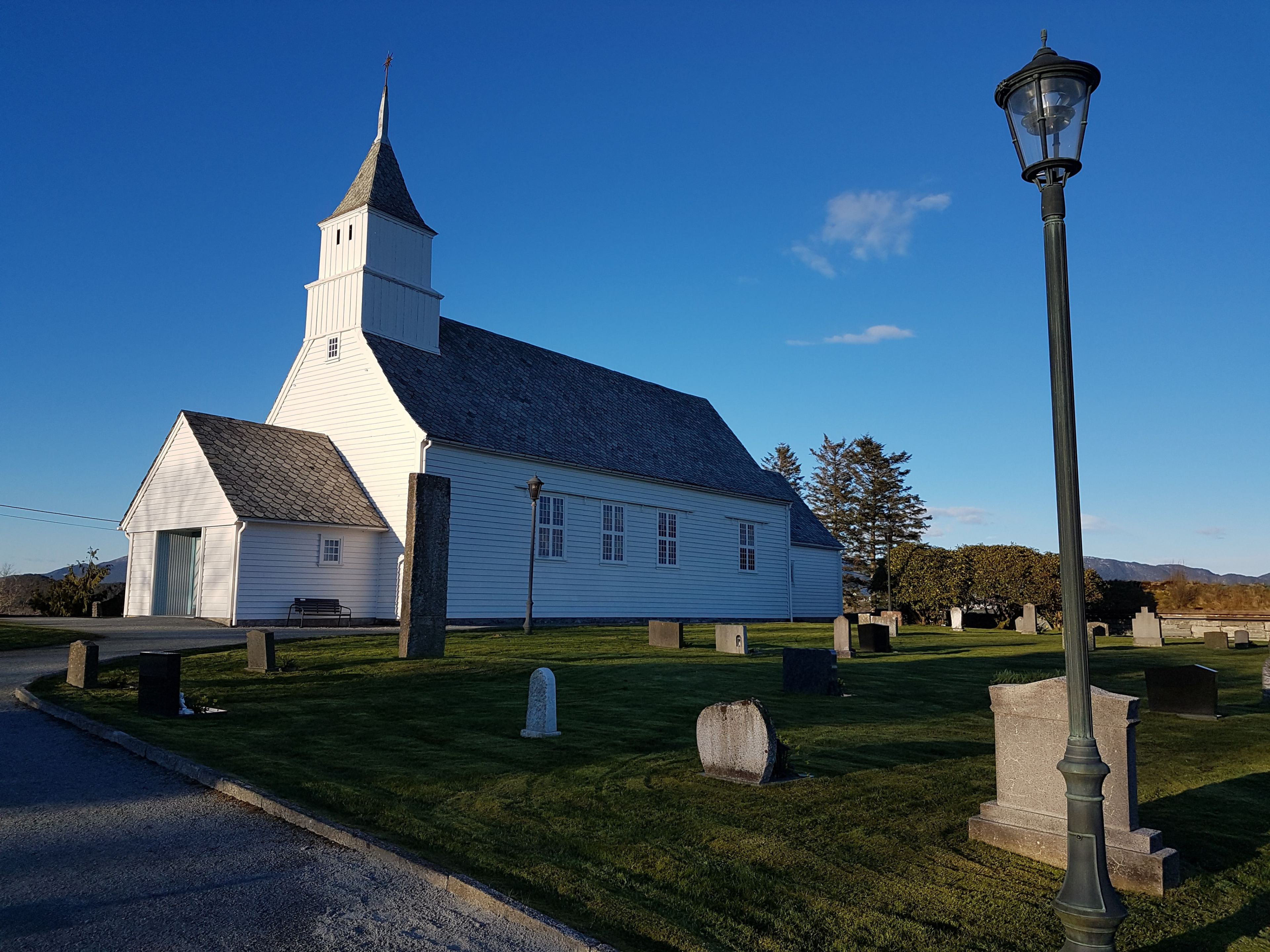 Eid kirke i Kvinnherad. Foto: Roger Grimelid. Fra Riksantikvarens Kulturminnesøk.